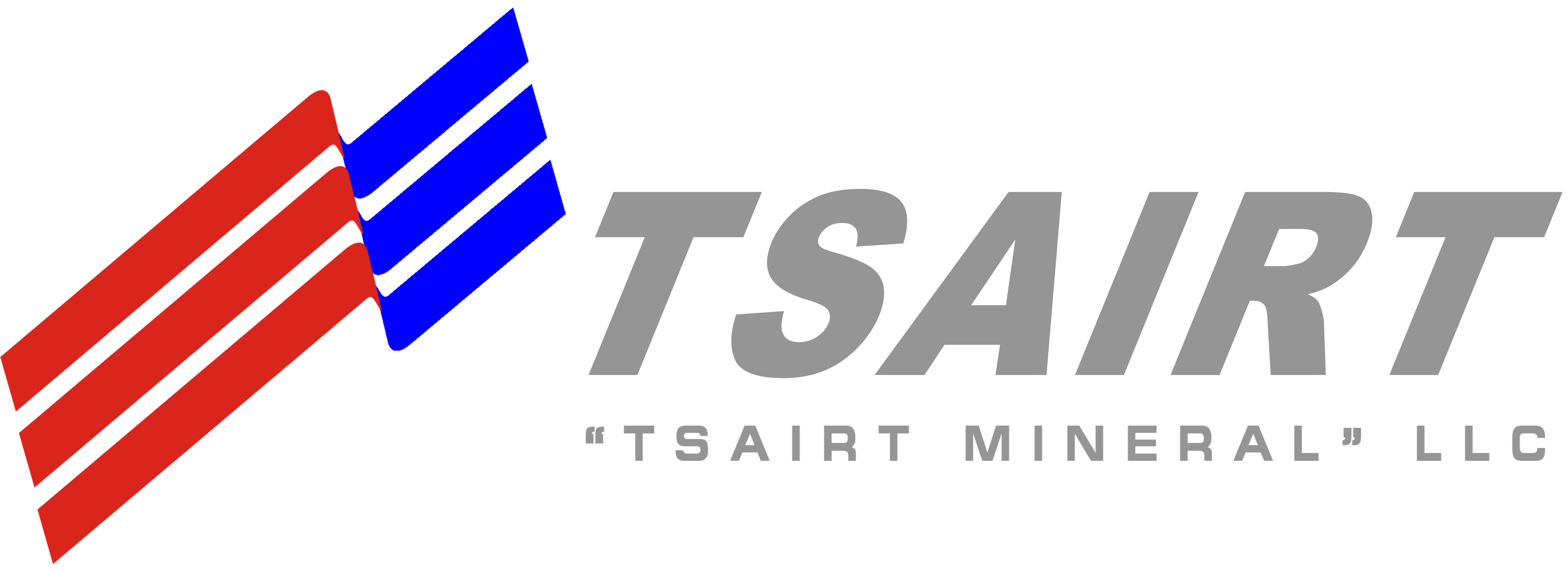 Монгол: company logo